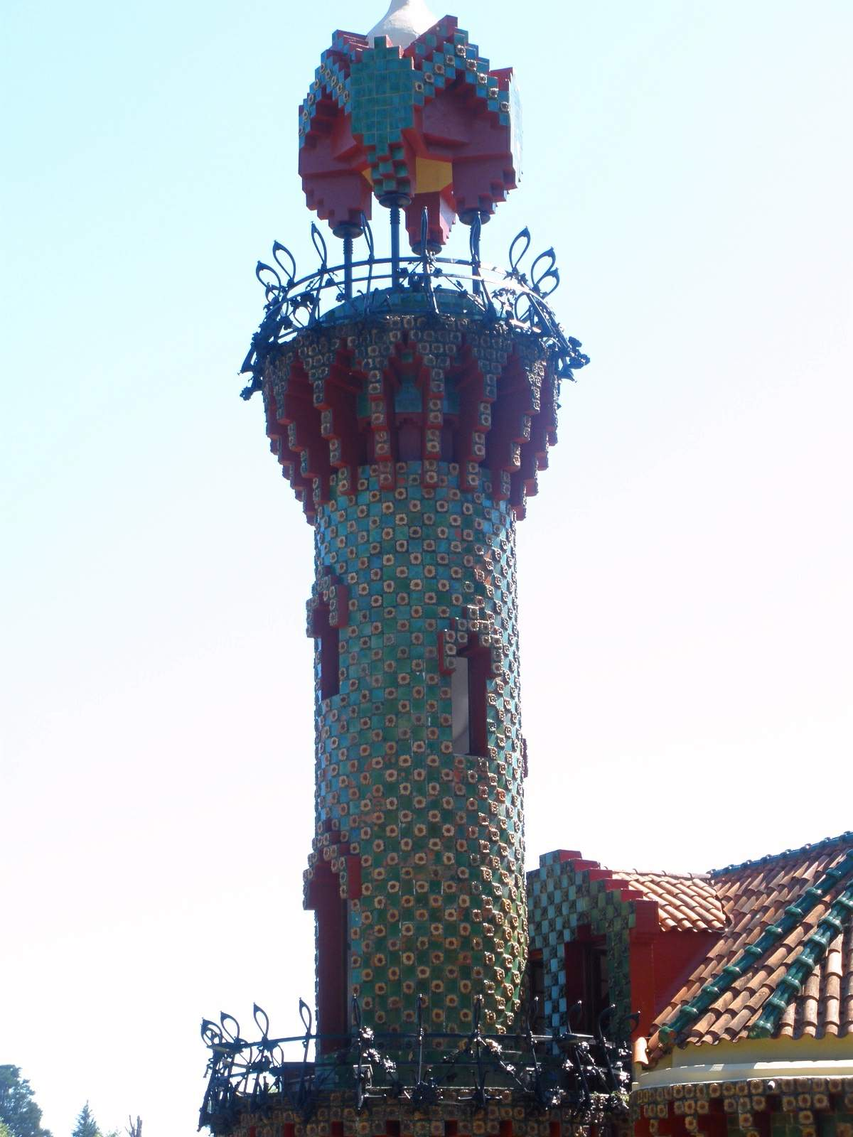 El Capricho, de Antoni Gaudí, en Comillas (Cantabria)